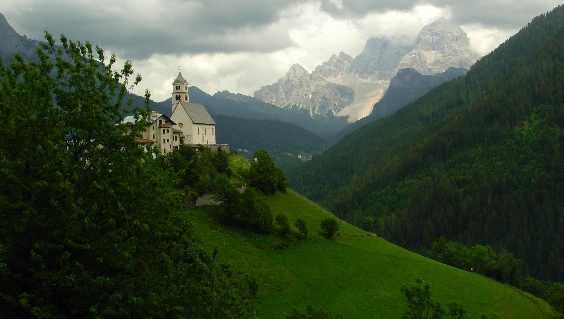 Italian Alps - landscape/Italijos Alpių kraštovaizdis